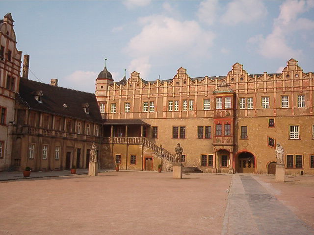 Bernburg, Sicht auf Innenhof andere Versionen: keine